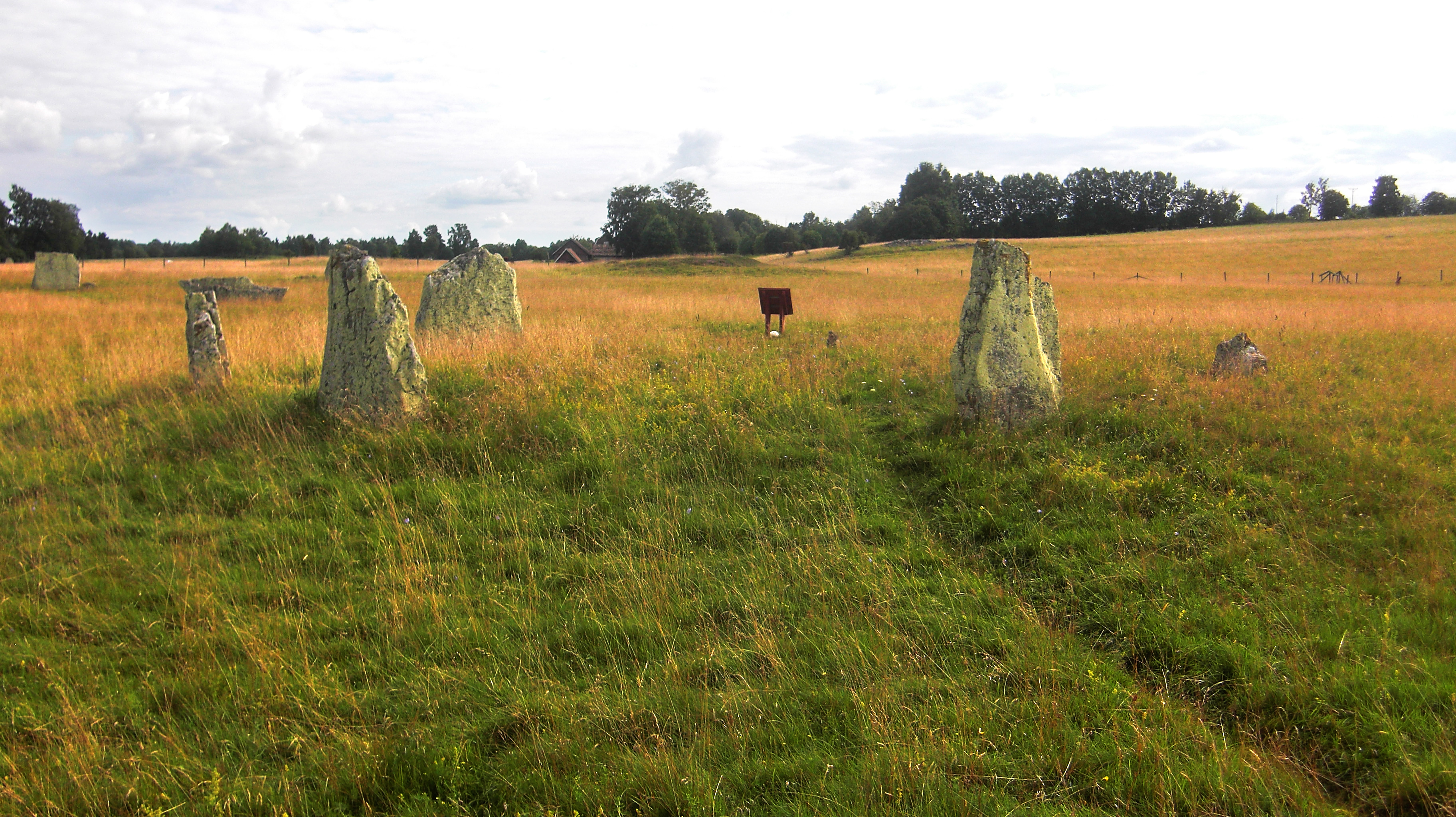 Domarring på gravfältet Ekornavallen (Raä-nr Hornborga 29:1) i Hornborga socken, Gudhems härad, Falköpings kommun, f.d. Skaraborgs län, Västergötland, Sverige.